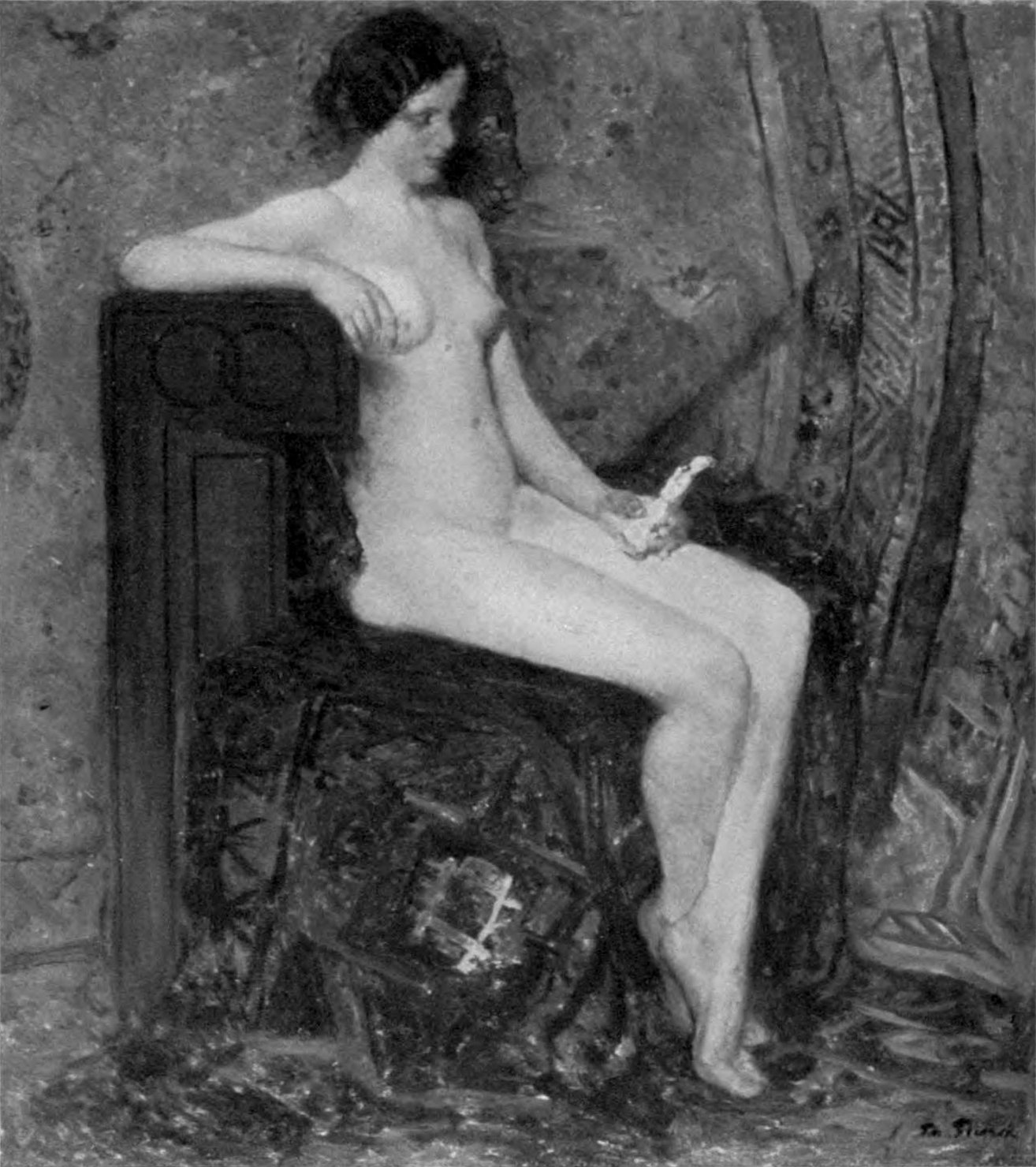 Mädchenakt